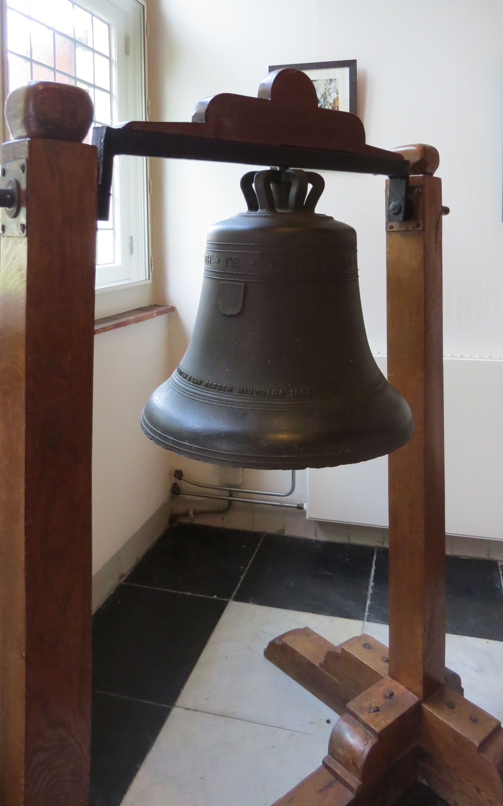 Willemstad (NB), Kopelkerk